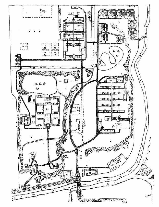 1909至1911年，埃米尔·斐士(Emil Fisher）完成的清华学堂前期建设。